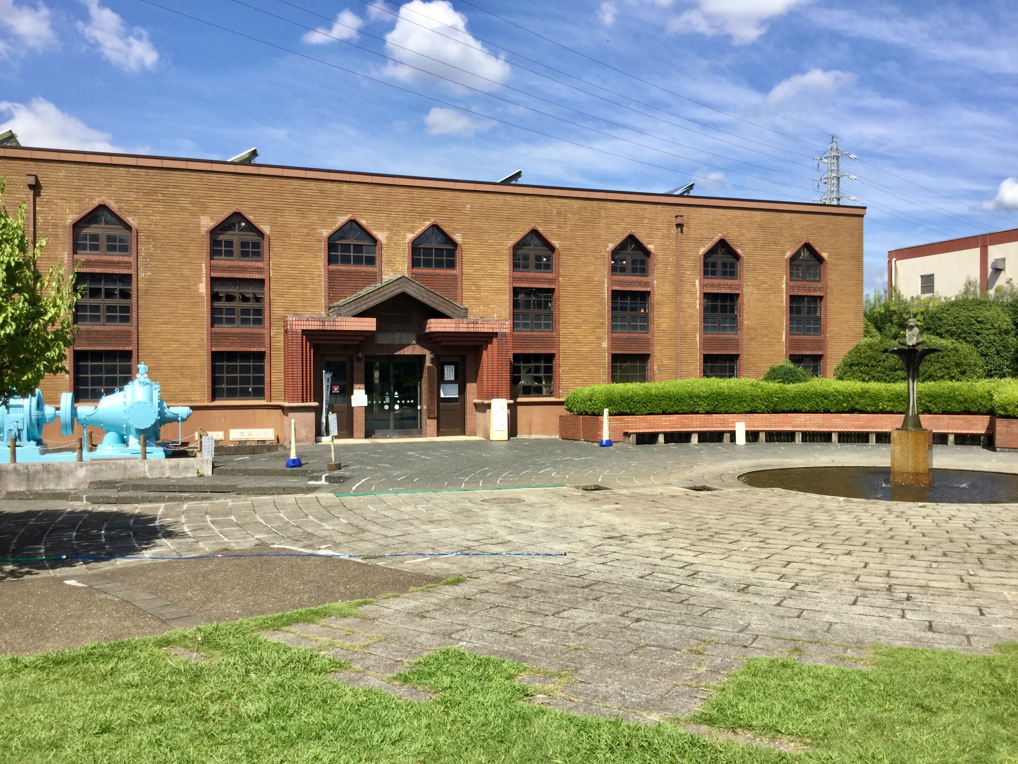 神奈川県にある水道記念館。